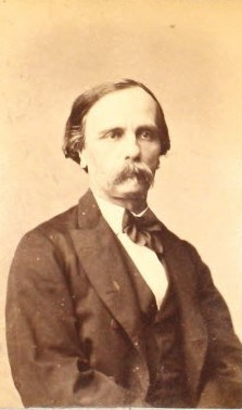 Ancien député du Var